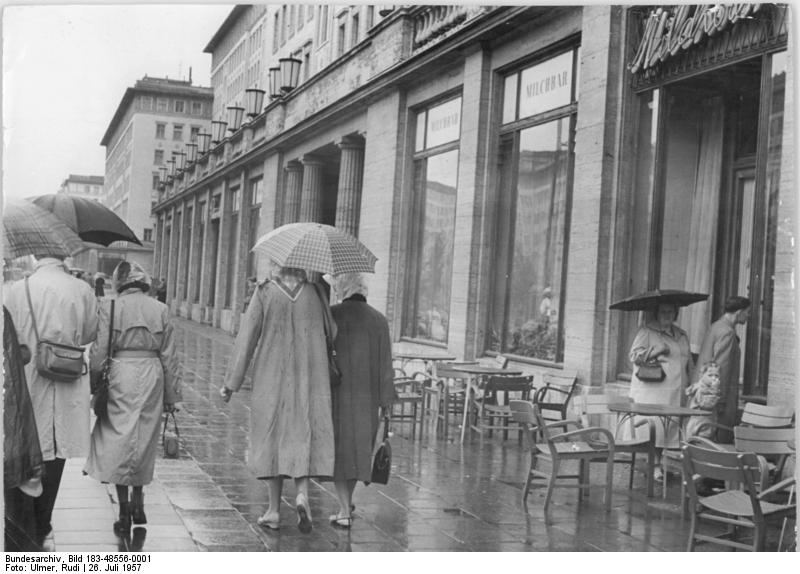 Zentralbild Ulmer 26.7.1957 Die Sonne hat Urlaub Verwaist stehen die Gartenstühle vor der Milchbar in der Berliner Stalinallee und warten genauso auf den Sonnenschein, wie die Passanten, die unter den Regenschirmen durch die Strassen hasten.